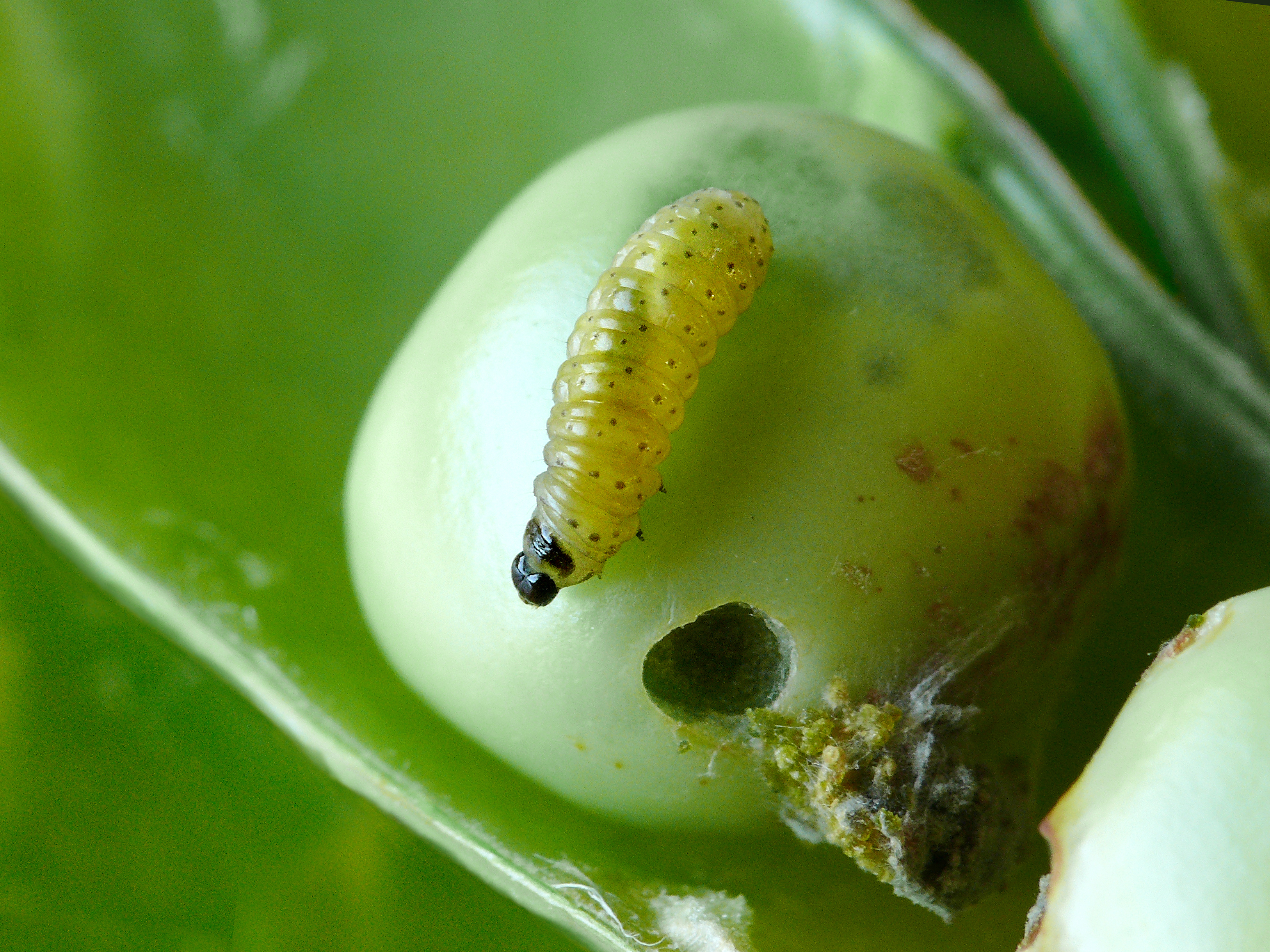 49.324 BF1257 Pea Moth, Cydia nigricana, larva.